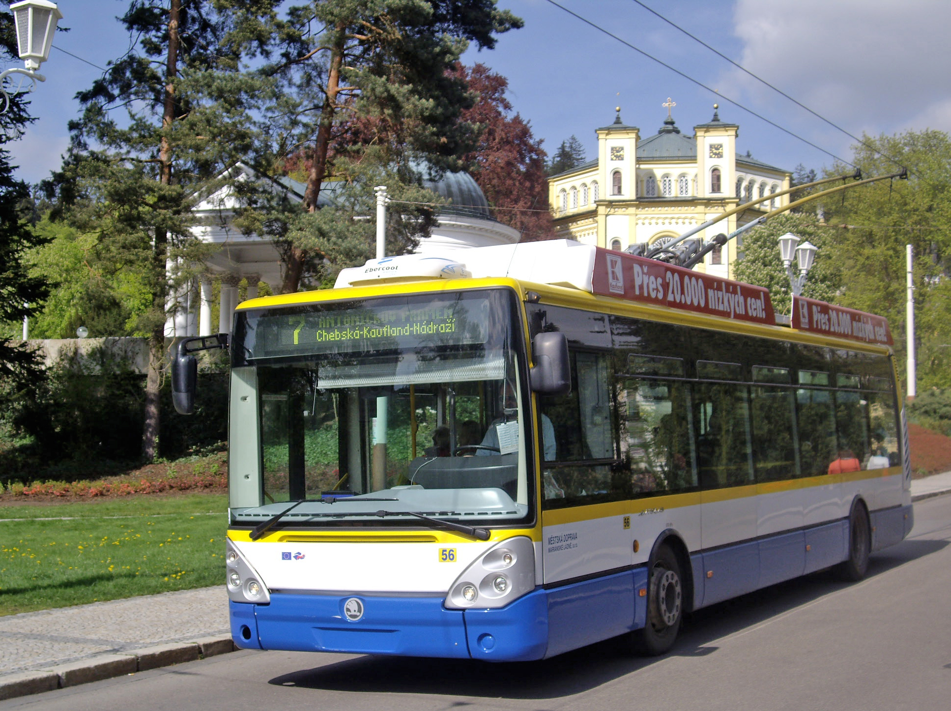 Trolleybus in Mariánské Lázně (Reitenbergerova).